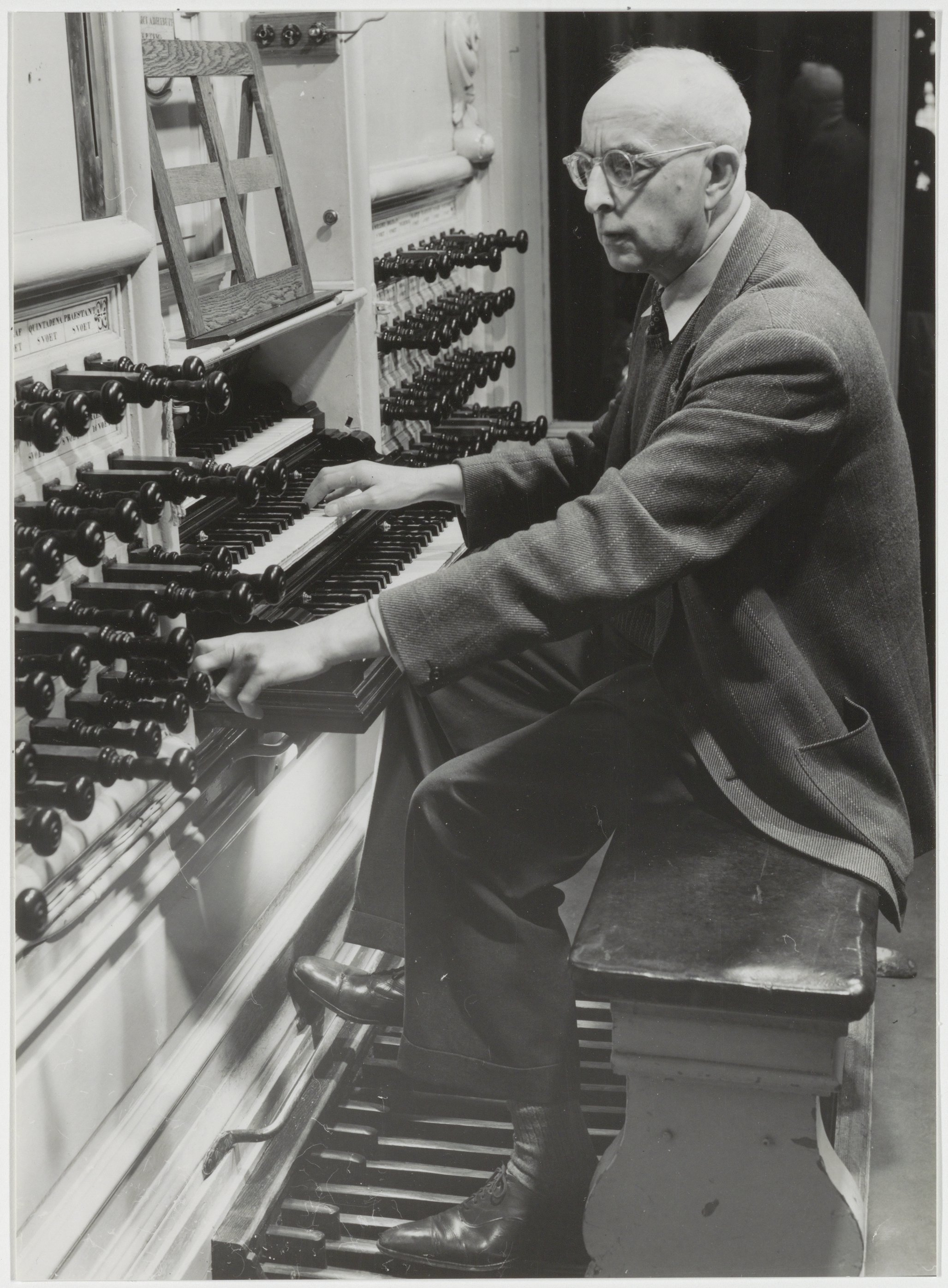 CollectieCollectie Fotoburo de BoerInventarisnummerNL-HlmNHA_54010722BeschrijvingGeorge Robert achter het Müllerorgel in de Grote of St. Bavokerk. Robert was stadsorganist van 1921-1956.FotonummerNL-HlmNHA_1478_2688DocumenttypePortrettenVervaardigerBoer, Cees de (1918-1985) Soort vervaardigerFotograaf Interieur/ExterieurinterieurPersonenRobert, George LandNederland ProvincieNoord-Holland GemeenteHaarlem PlaatsHaarlem StraatGrote Markt GeografischCentrum Begindatum1956Einddatum1956TechniekFoto TrefwoordenKerken, kerkorgels